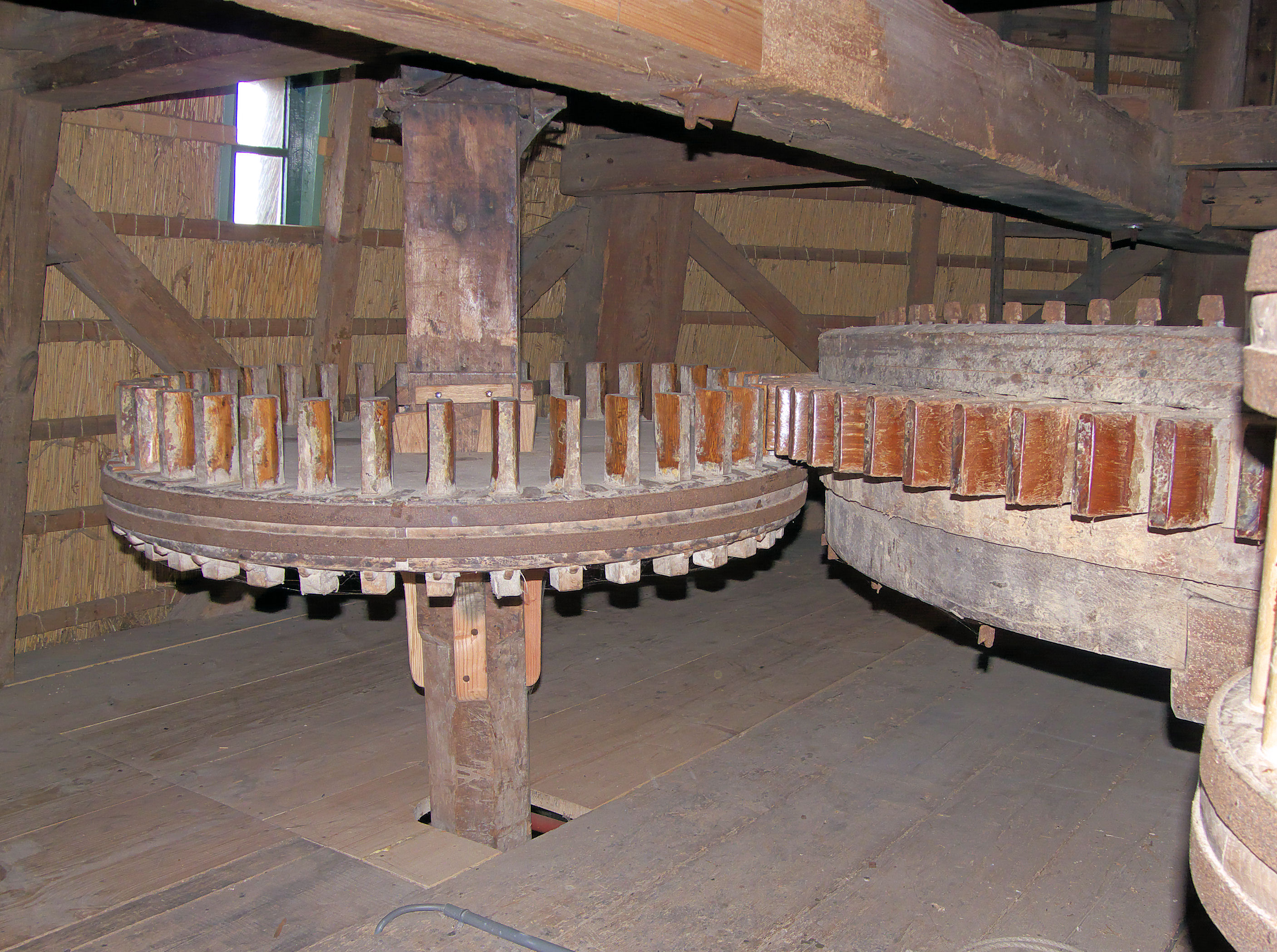 Molen Het Prinsenhof, dooieman en ravenswiel